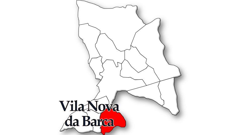 População